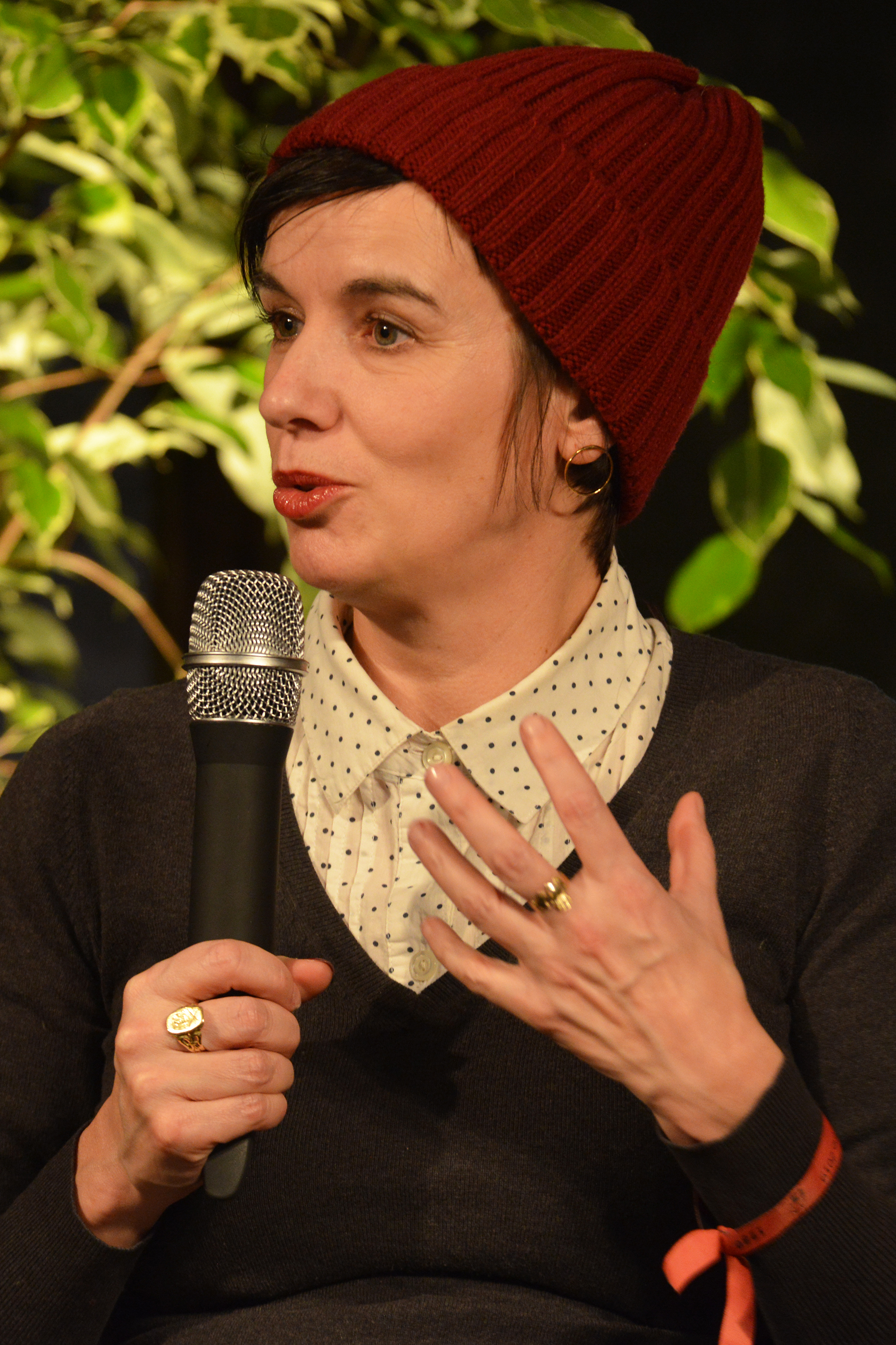 Jury du festival 2019 sur le plateau de la web TV interrogé par Sonia Déchamps. Présidé par l'autrice Dominique Goblet, le jury comprend également l'autrice Pénélope Bagieu, le délégué artistique de l'Orchestre de Paris Édouard Fouré Caul-Futy, l'animateur Augustin Trapenard, la journaliste Pauline Croquet et le libraire Jérôme Briot. Festival International de la Bande Dessinée d'Angoulême 2019.